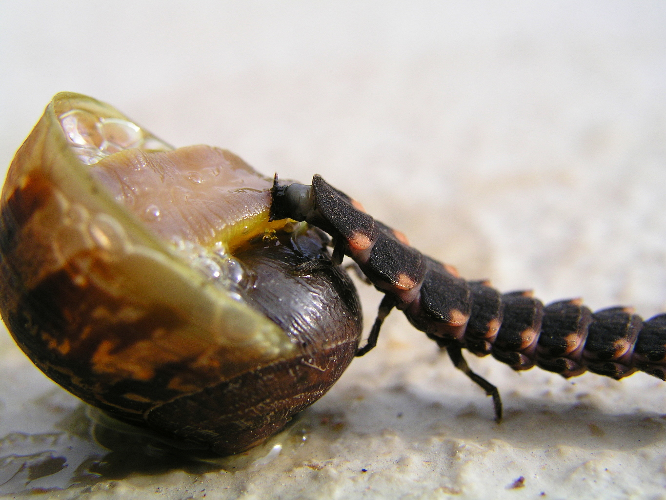 "Raupe" vs Schnecke (Es handelt sich um eine Leuchtkäferlarve, vielleicht Lampyris noctiluca?) Antw: jawohl! --Vitalfranz 11:40, 18 November 2007 (UTC) The snail is Helix aspersa, determined 04 June 2011 by Francisco Welter-Schultes